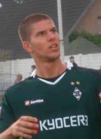 Christian Dorda beim Testspiel bei Union Nettetal